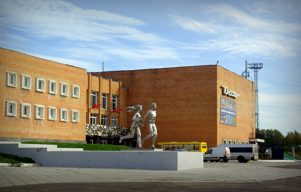 Рыбинск. Микрорайон Волжский. ФОК «Юность»